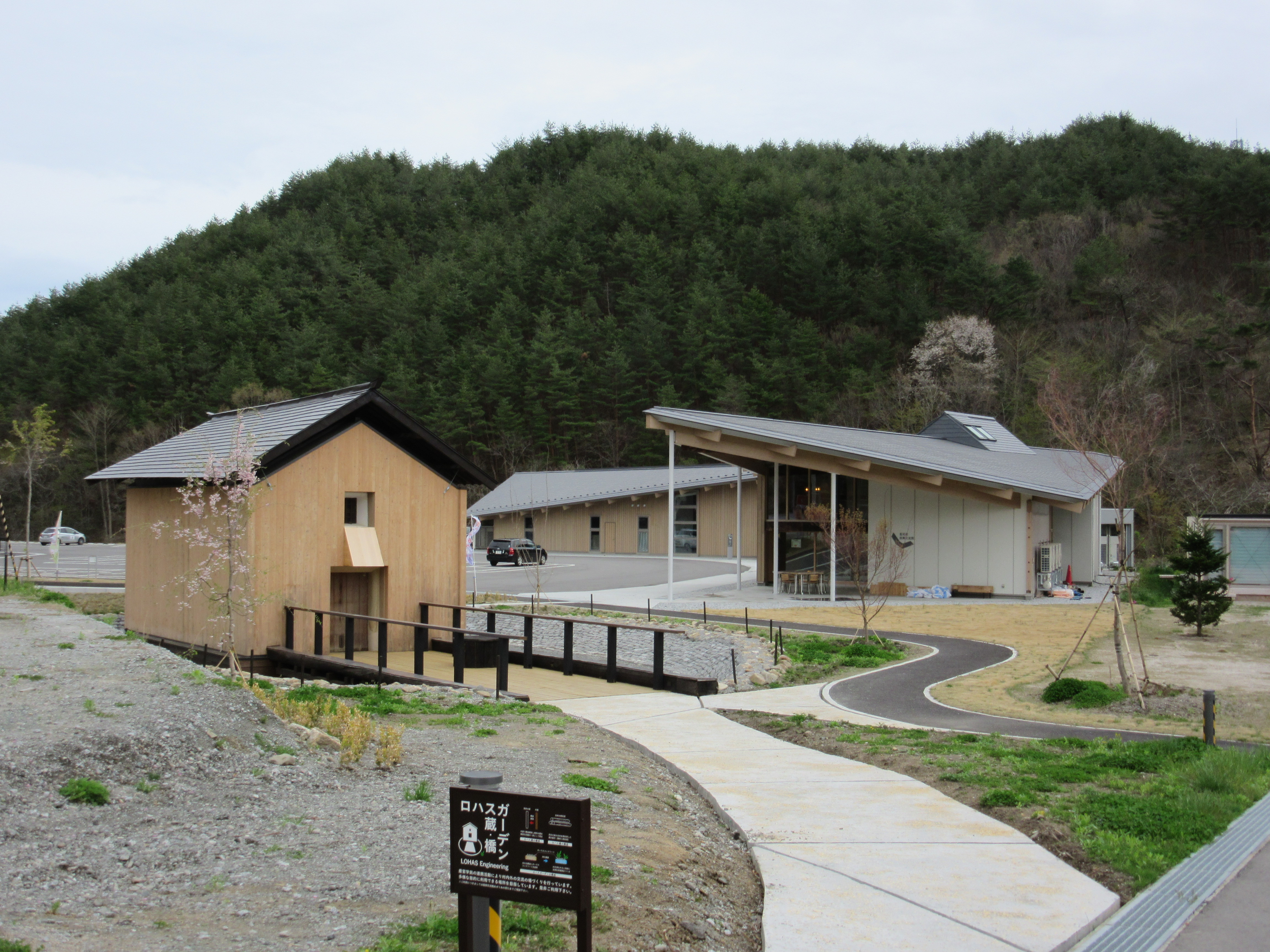 葛尾村復興交流館あぜりあ Canon PowerShot SX600 HS